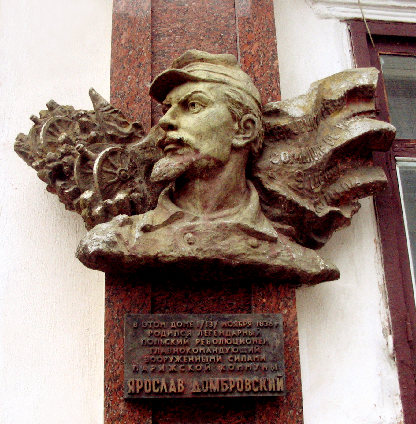 Пам'ятна дошка-монумент на будинку, в якому народився Ярослав Домбровський. Житомир, скульптор Йосип Табачник, арх. Петро Бiрюк, вул. Мала Бердичівська 10.